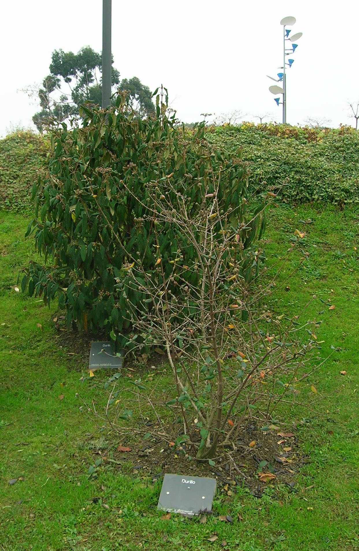 Durillos (viburnum) en el Jardín Botánico de Barakaldo. Autor: Javier Mediavilla Ezquibela Fecha: 7 de enero de 2006.